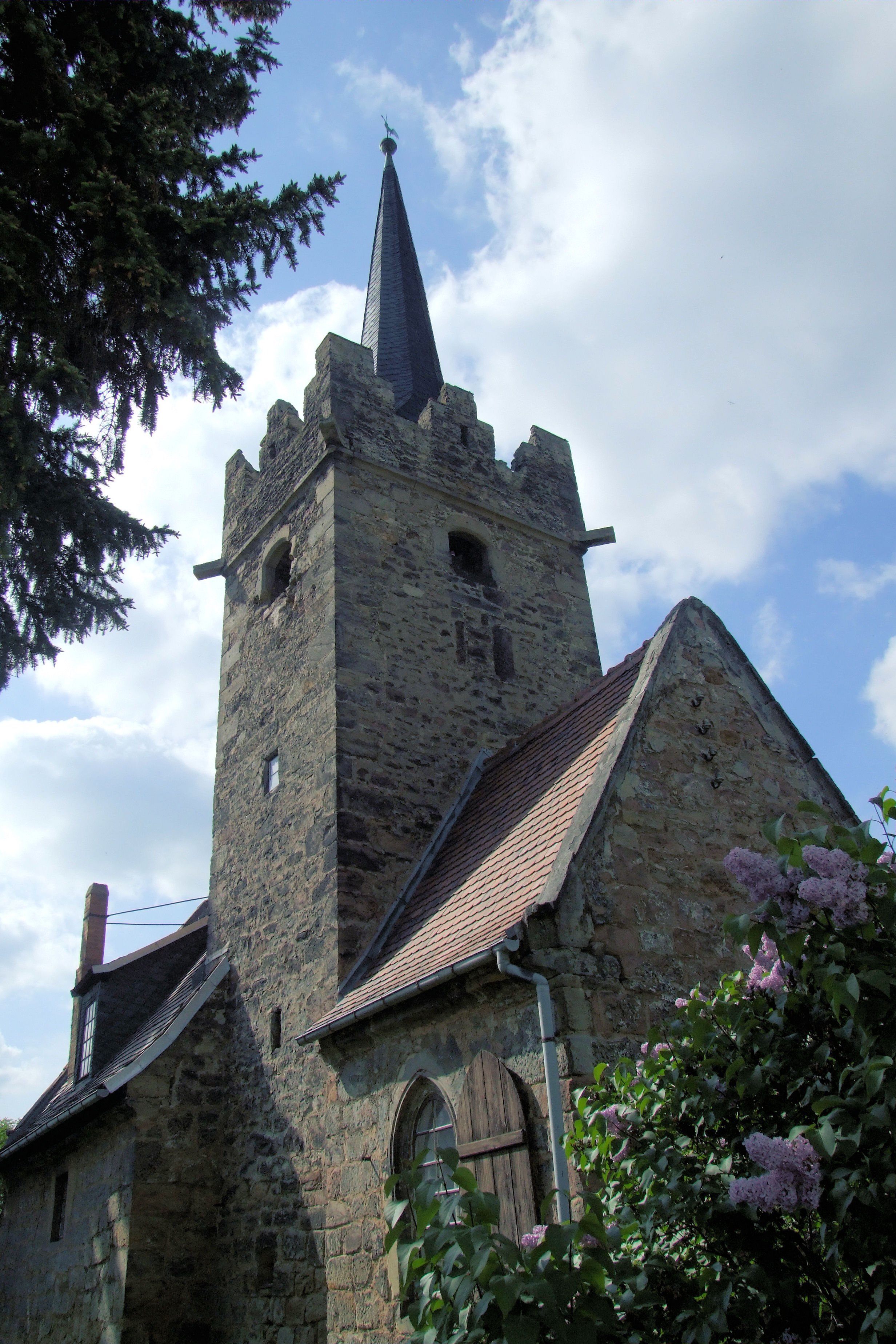 Kirche Schaala